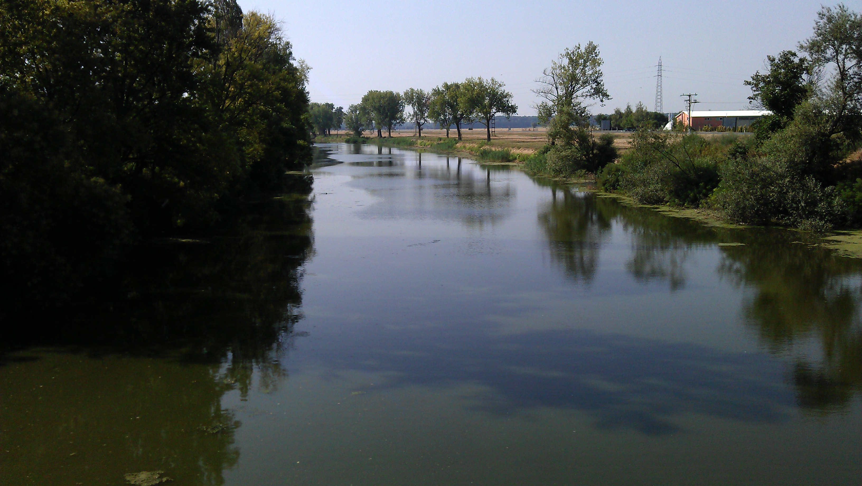 Bosut